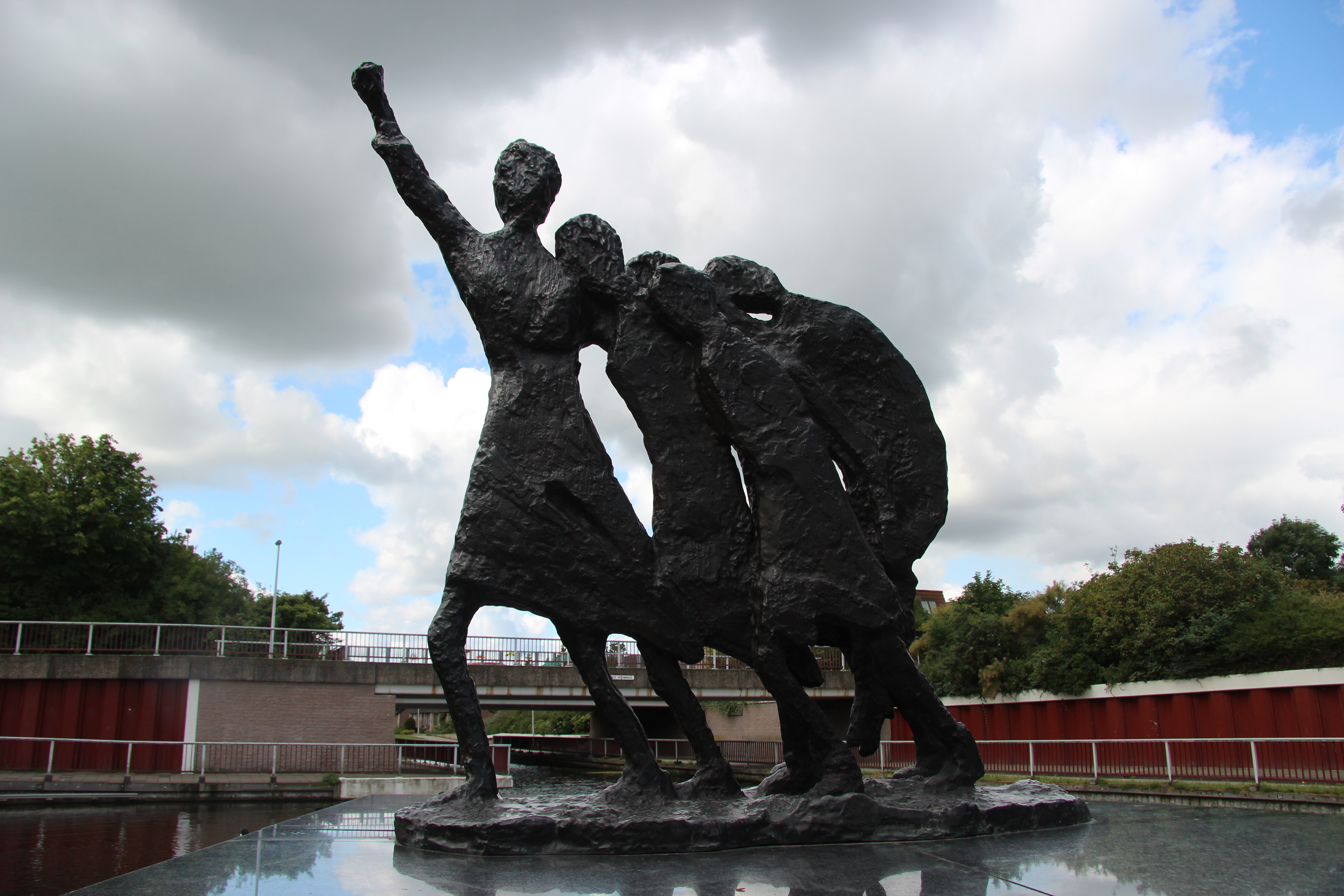 Truus Menger-Overstegen - Leidse vrouwen uit het verzet - 1985, A. van Alkemadestraat in Leiden